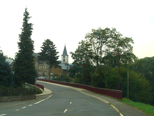 Maring-Noviand im Landkreis Bernkastel-Wittlich